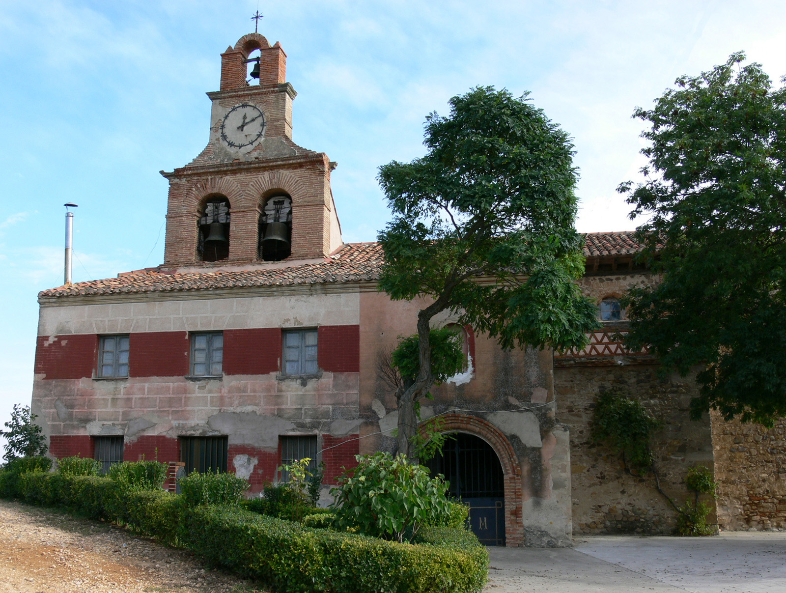 Iglesia de San Martín de Tours en Corporales (La Rioja - España)